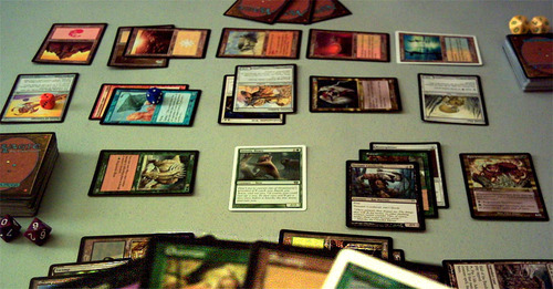 Magic l'assemblée cartes